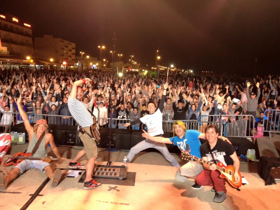 FLAGRANTS DÉLIRES à NARBONNE